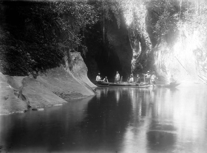 Negatief. Een groep mannen vaart met vlerkprauwen door een druipsteengrot bij Sagea, Halmahera